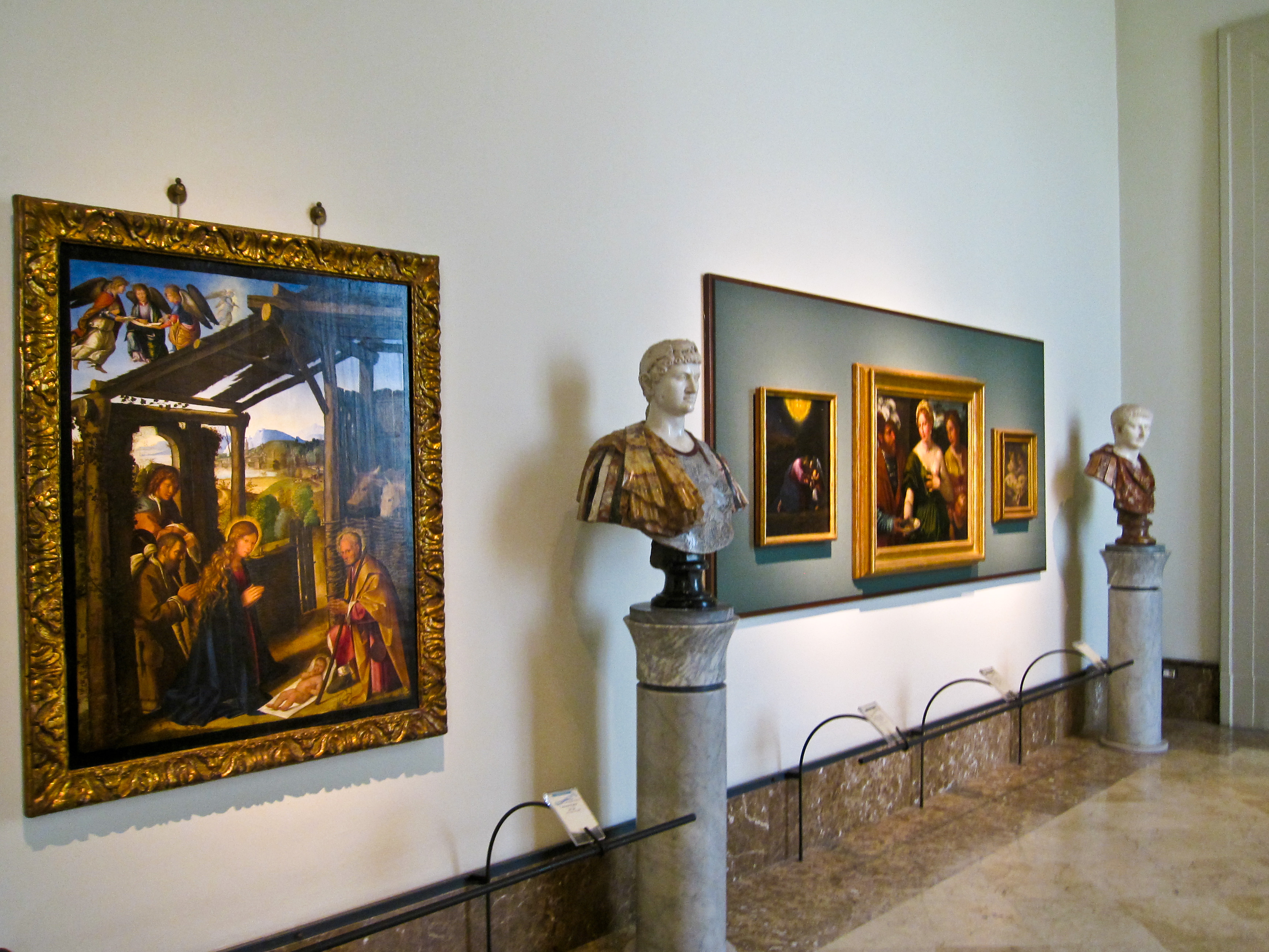 Una sala del Museo di Capodimonte a Napoli (Galleria Farnese, sala 16).